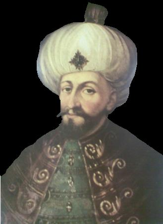 Mehmed III